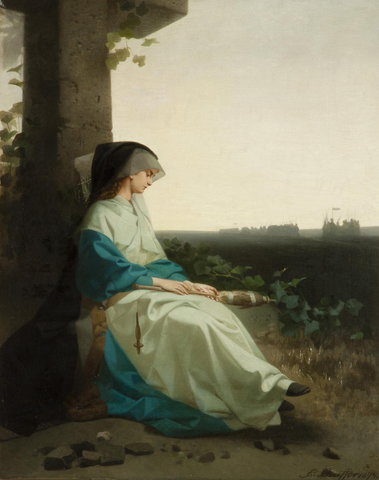 Abschiednahme, rechts unten signiert und datiert: E. Lauffer